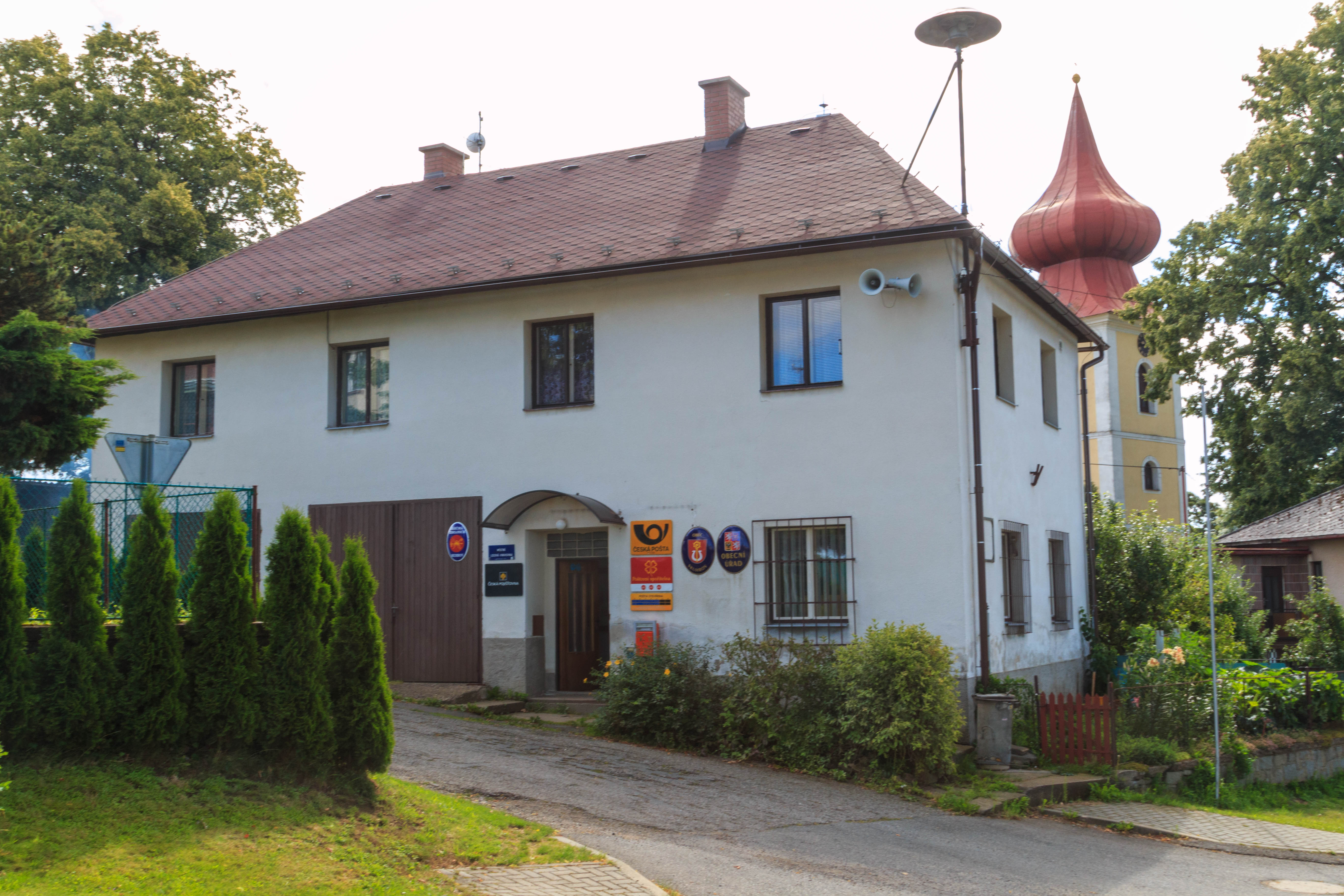 Skuhrov u Havlíčkova Brodu - pošta